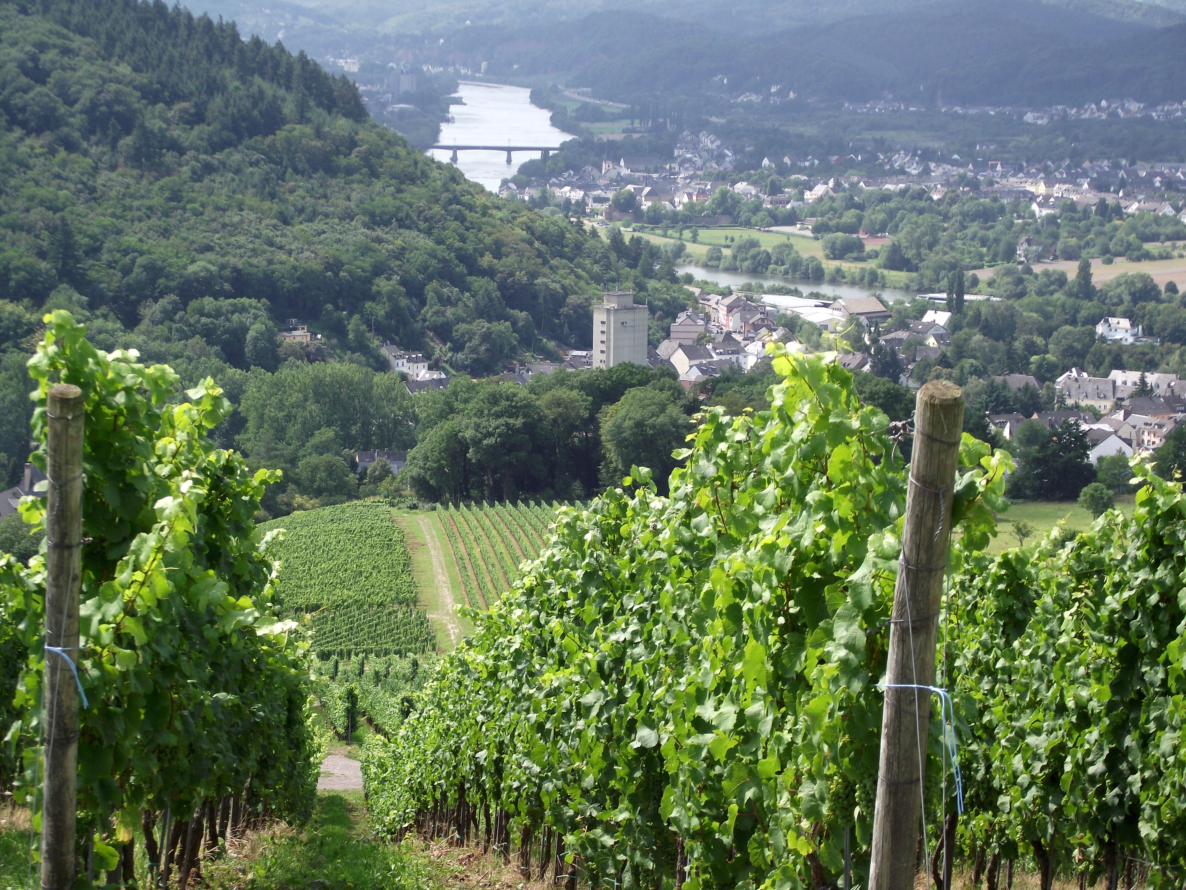 Blick ins Moseltal oberhalb von Ruwer